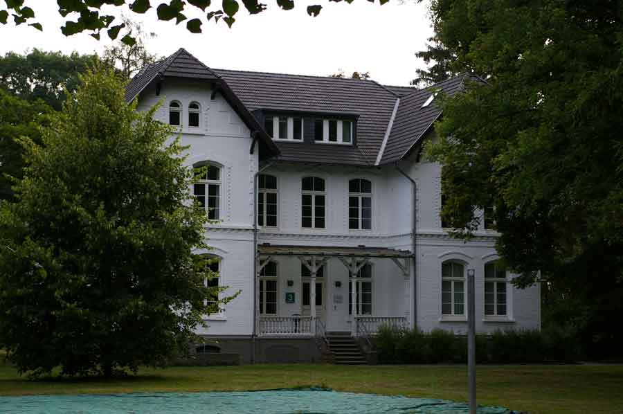 Galkhausen Haus 3